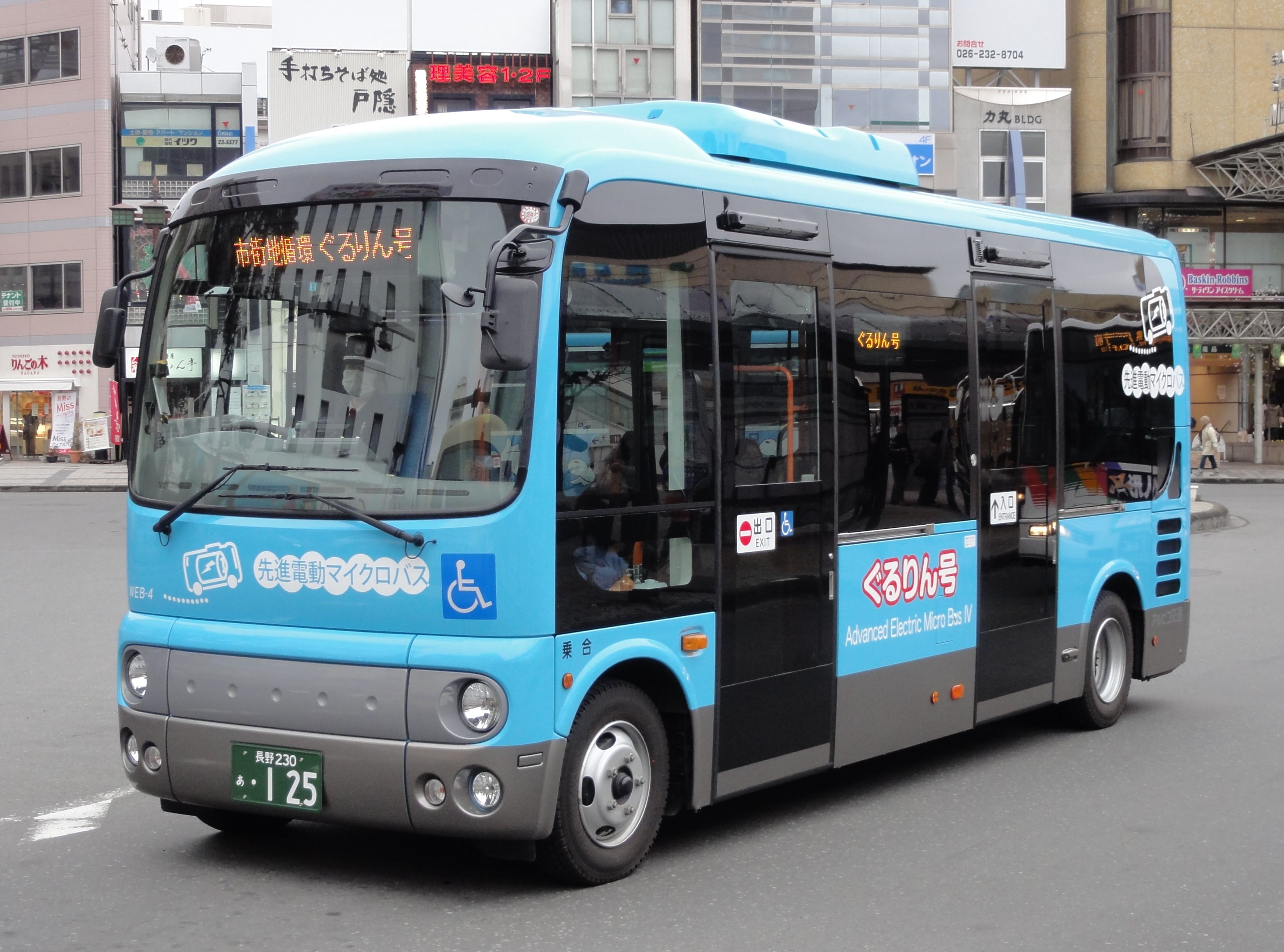 中心市街地循環バス「ぐるりん号」